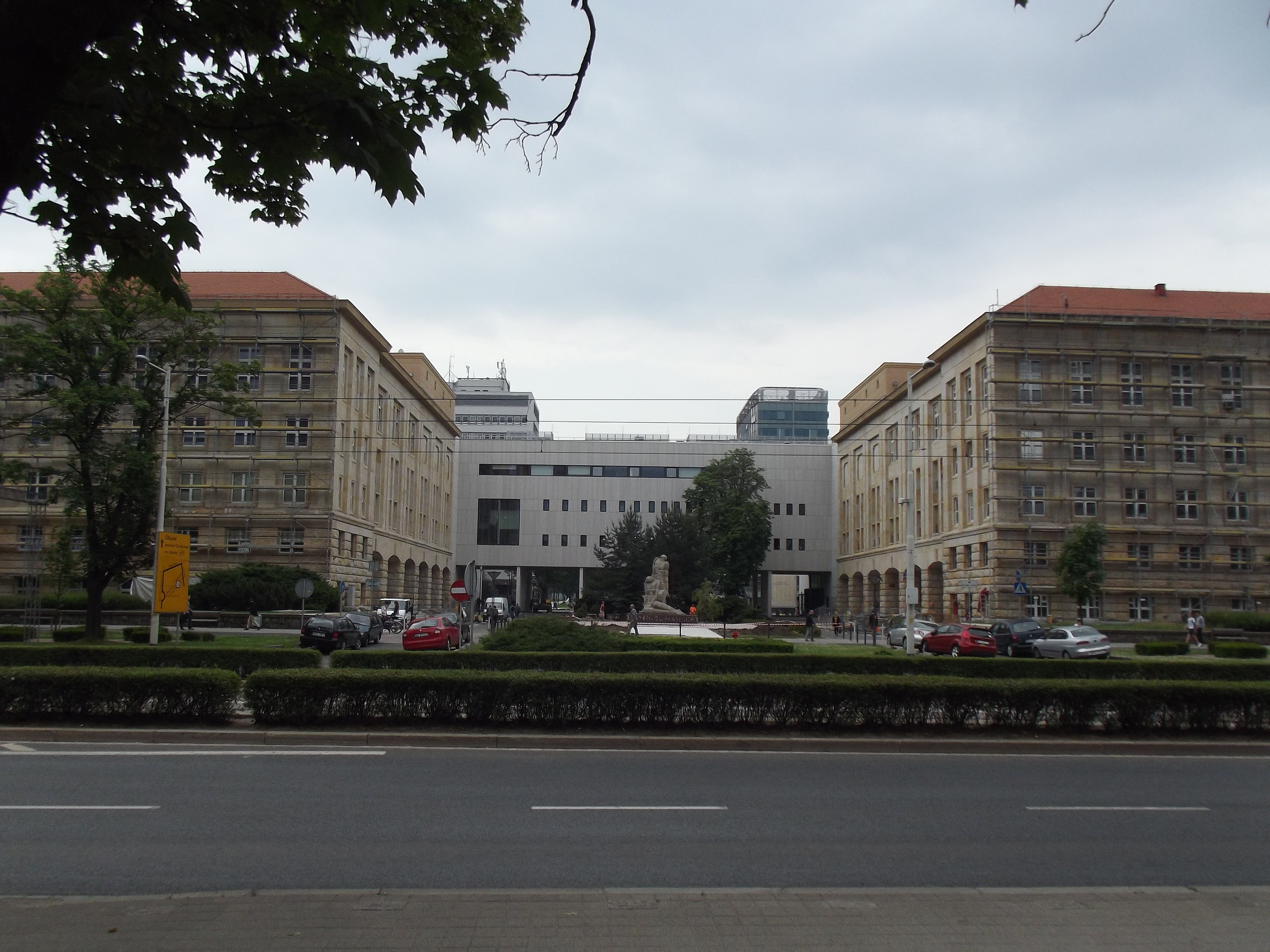 Wejście do nowszej części kampusu Politechniki Wrocławskiej od pl. Grunwaldzkiego (na pierwszym planie budynki D1 i D2 za nimi C5 i C7, pomiędzy nimi C21)